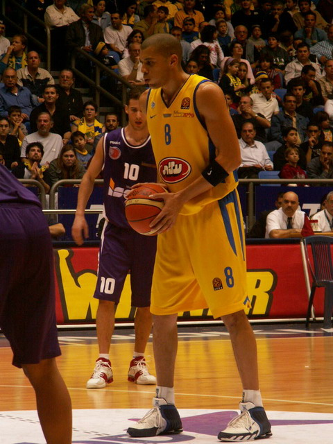 אנתוני פארקר